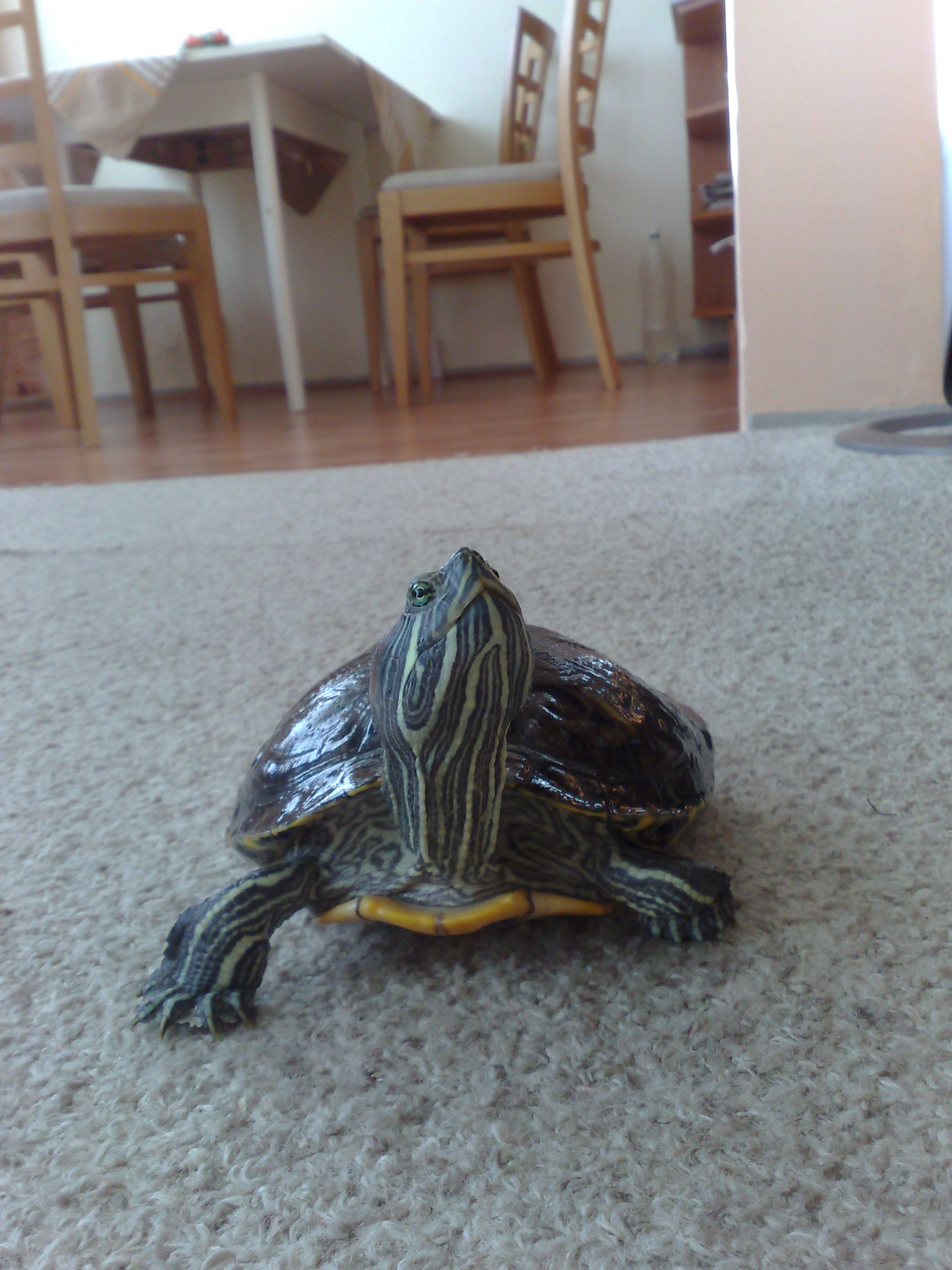 želva nádherná (trachemys scripta elegans)